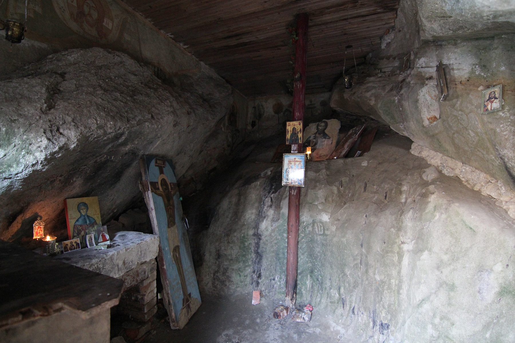 Ruine chilii rupestre la Cetățeni: Peștera Moșului 02